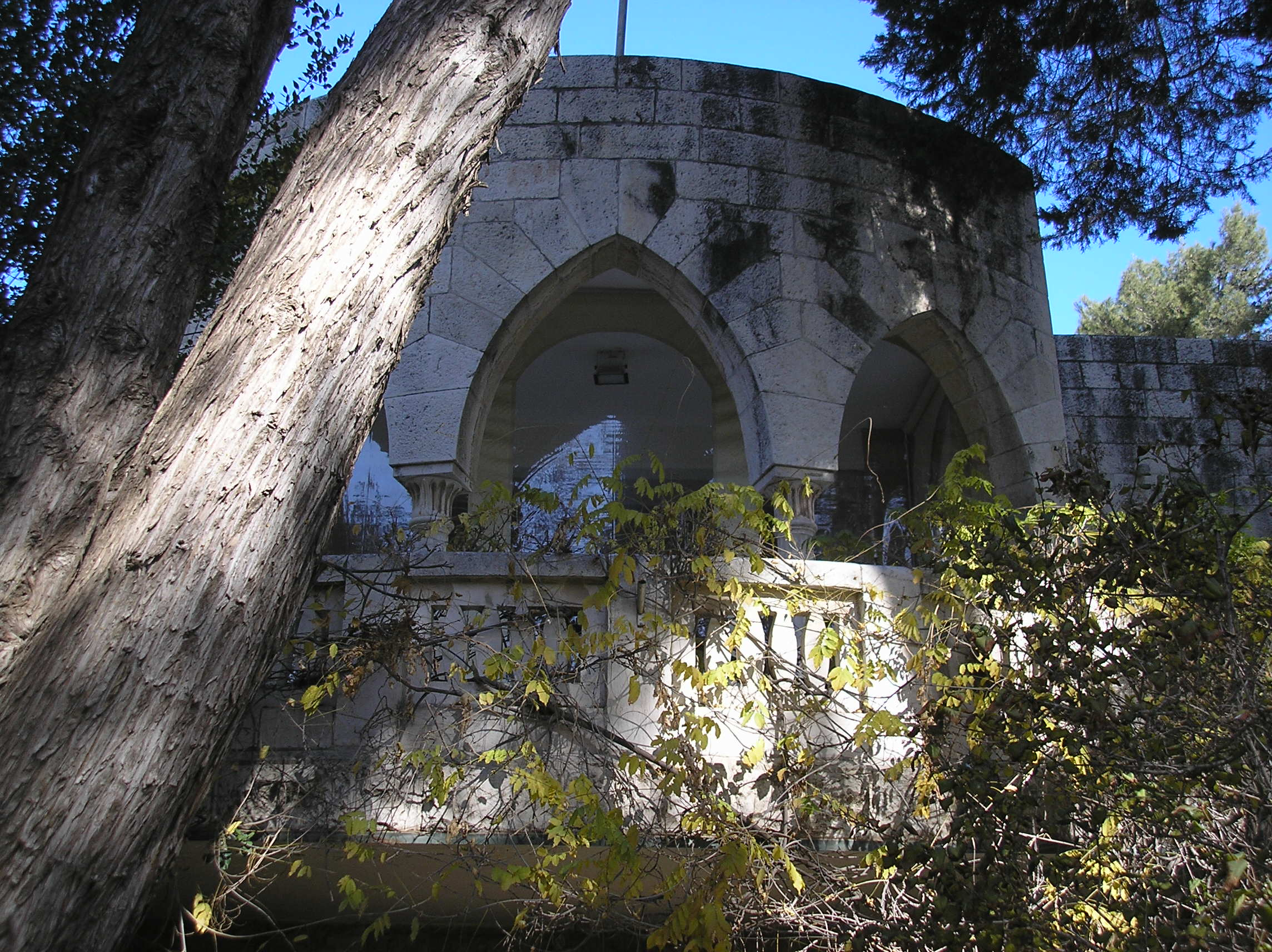 Vila Morkus